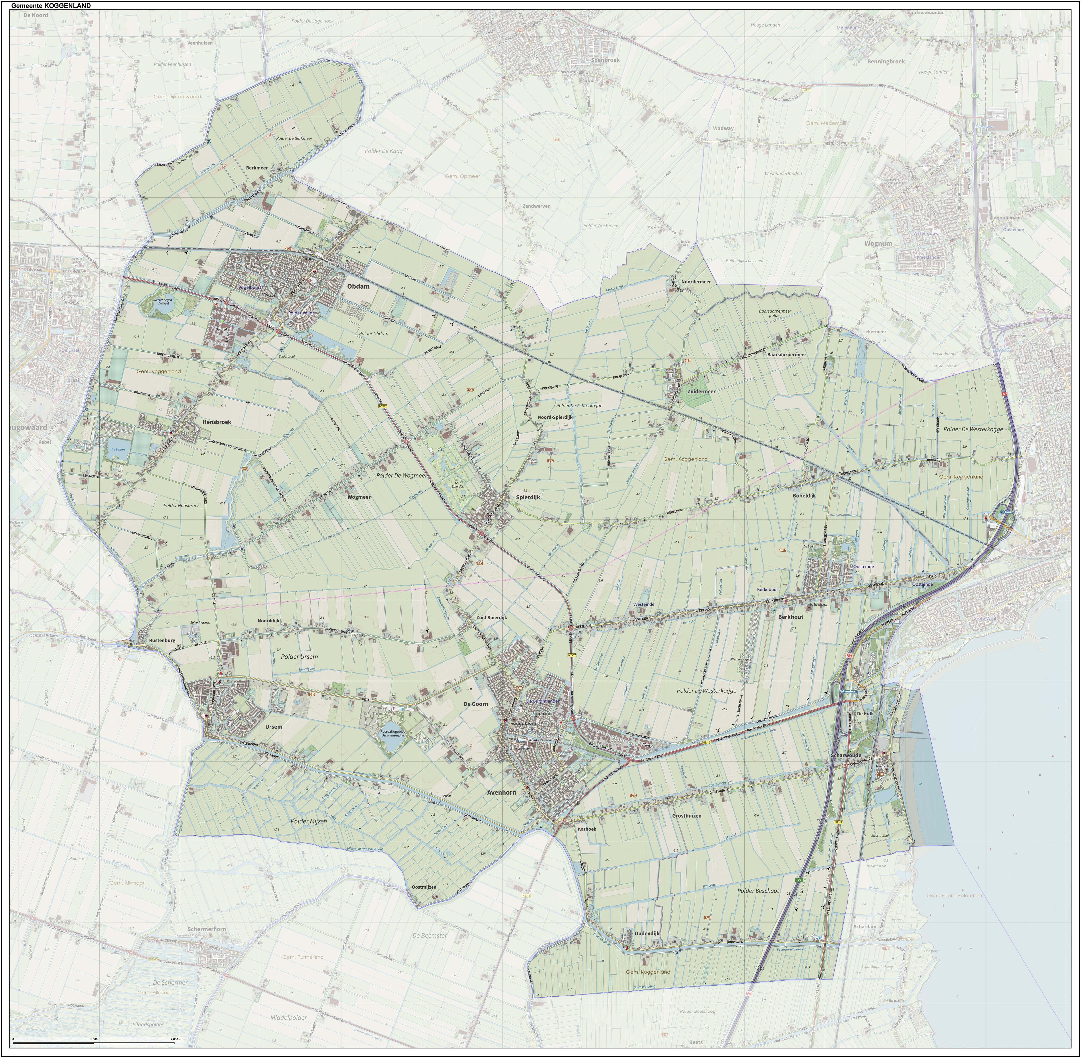 Topografische gemeentekaart. Resolutie: 400 pixels/km. Kaartbeeld samengesteld uit de open geodata van de Top10NL en Top25namen (Kadaster), Creative Commons-BY licentie. Gebouwvlakken uit open geodata BAG extract. Wegen uit de OpenStreetMap, OpenStreetMap community. Reliëfschaduw uit de Actuele Hoogtekaart AHN2. Samenstelling en kleurenschema: Jan-Willem van Aalst, met QGIS. Zie ook de Legenda.